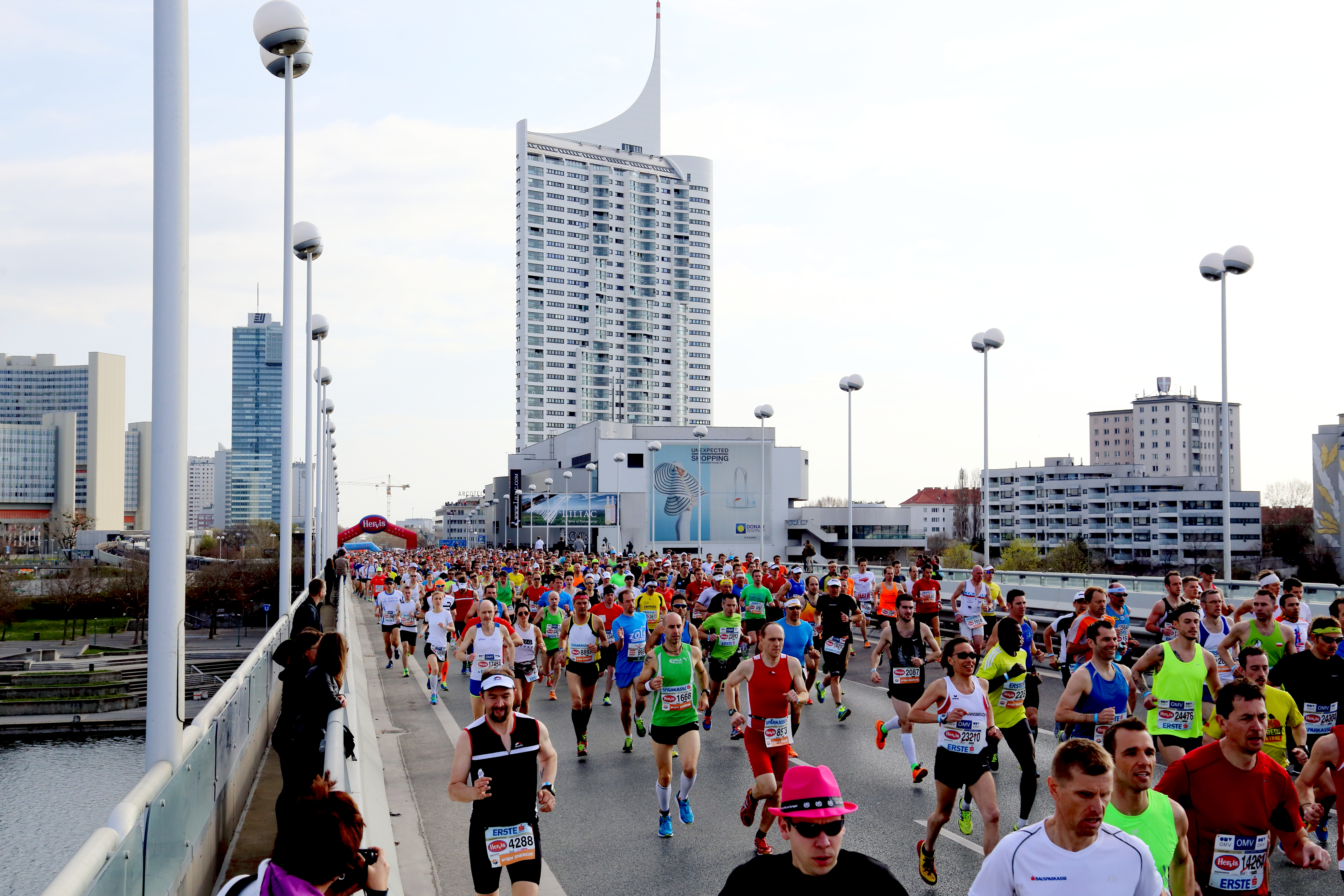 Läufer des 32. Vienna City Marathon im Bereich Reichsbrücke mit dem Hochhaus Neue Donau im Hintergrund. Insgesamt gab es 42.742 Anmeldungen aus 129 Nationen (Marathon 9.064, OMV Halbmarathon 16.145, Stadion Center Staffel Marathon 14.576 (=3.644 Teams), Coca-Cola 4.2 1.580, Coca-Cola 2.0 1.377). Sieger wurde der Äthiopier Sisay Lemma mit einer Zeit von 2:07:31 Stunden.